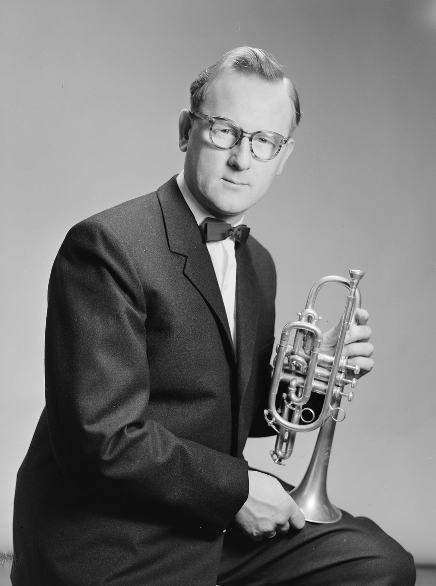 Harry William Kvebæk er en norsk trompetist.